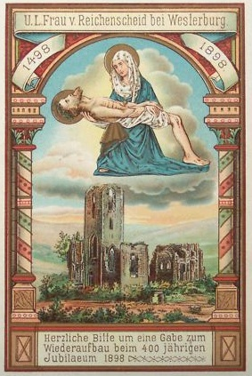 Wallfahrtsbild Liebfrauenkirche Westerburg